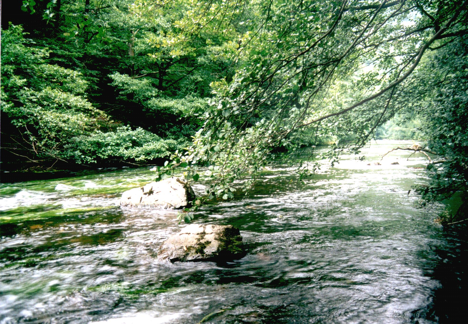 Wilde Bode in der Bodeschlucht bei Thale.